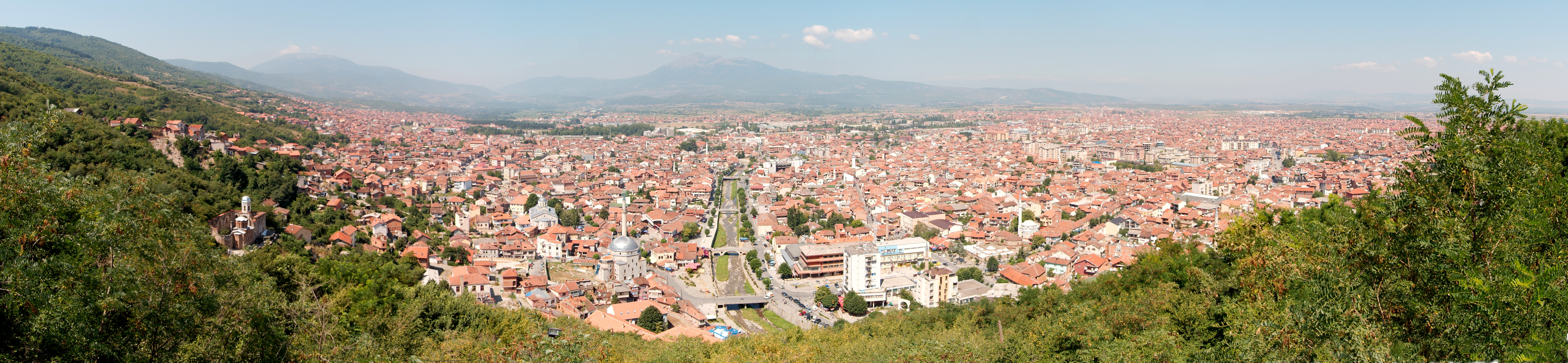 Panorama of Prizren